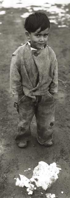 gamin pauvre - domaine public ( Credit:US Department of Agriculture)